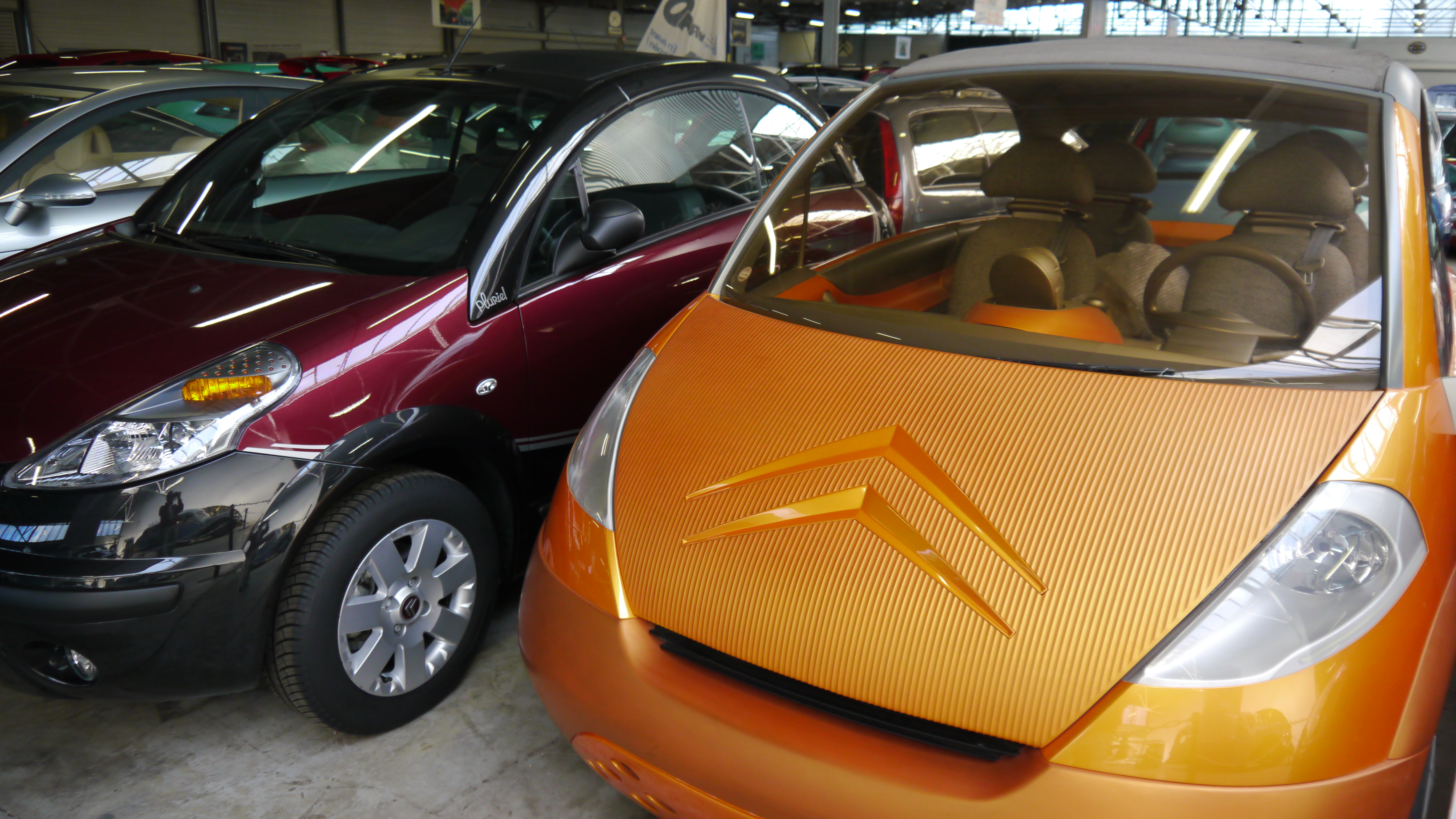 Conservatoire Citroen 235 Citroen Pluriel